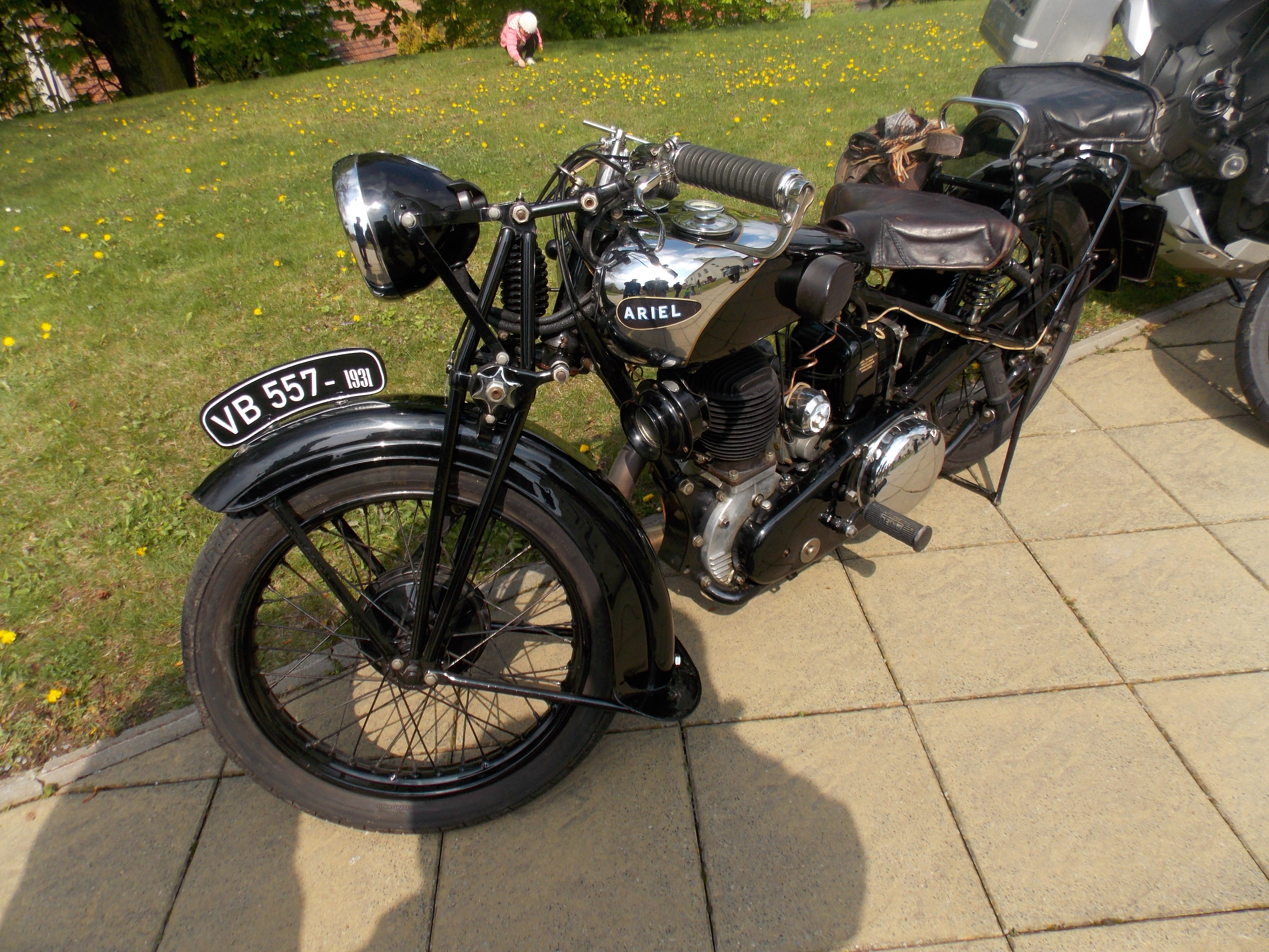 ARIEL VB 557-1931 na motoakci ve Švábenicích